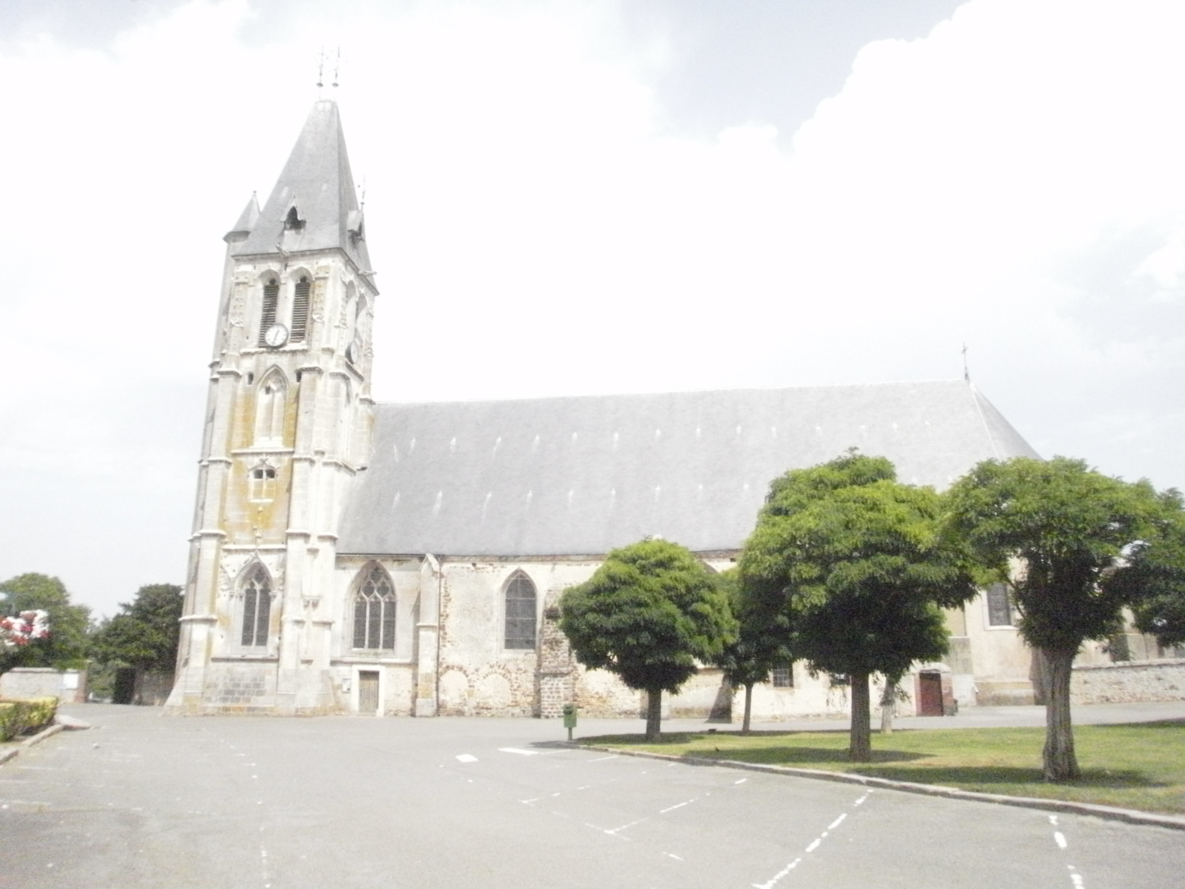 Église Saint-Nicolas de Brezolles, Eure-et-Loir (France). .